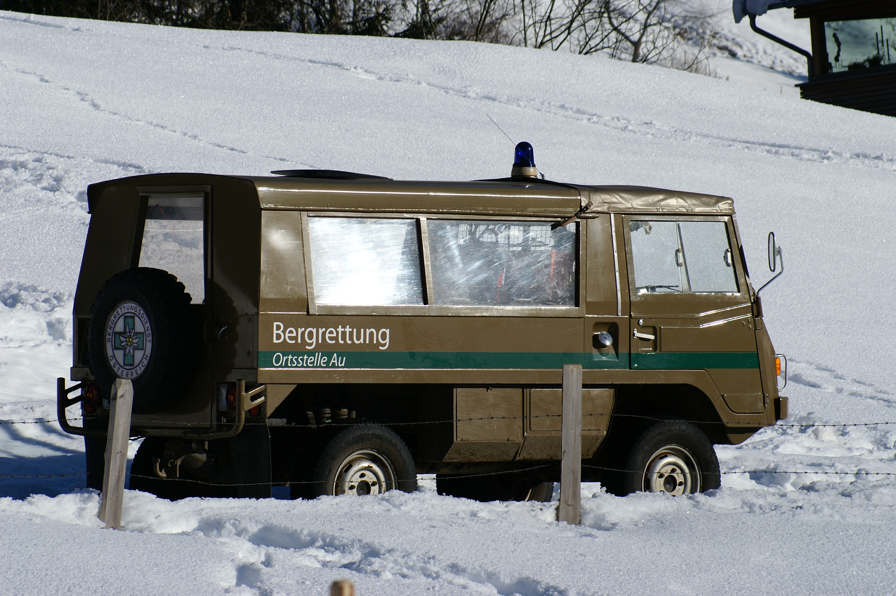 Pinzgauer der Bergrettung Au-Rehmen im Bregenzerwald